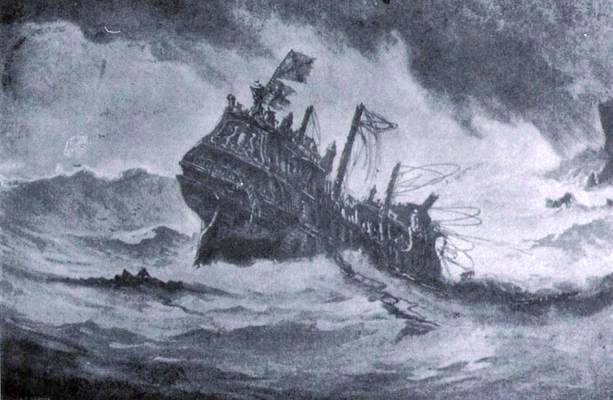 El navío inglés Revenge, rendido sobre la isla de Flores.